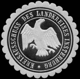 Siegelmarke des Kreisausschusses des Landkreises Insterburg, Provinz Ostpreußen. Wappenadler des Freistaats Preußen (Zeit der Weimarer Republik).